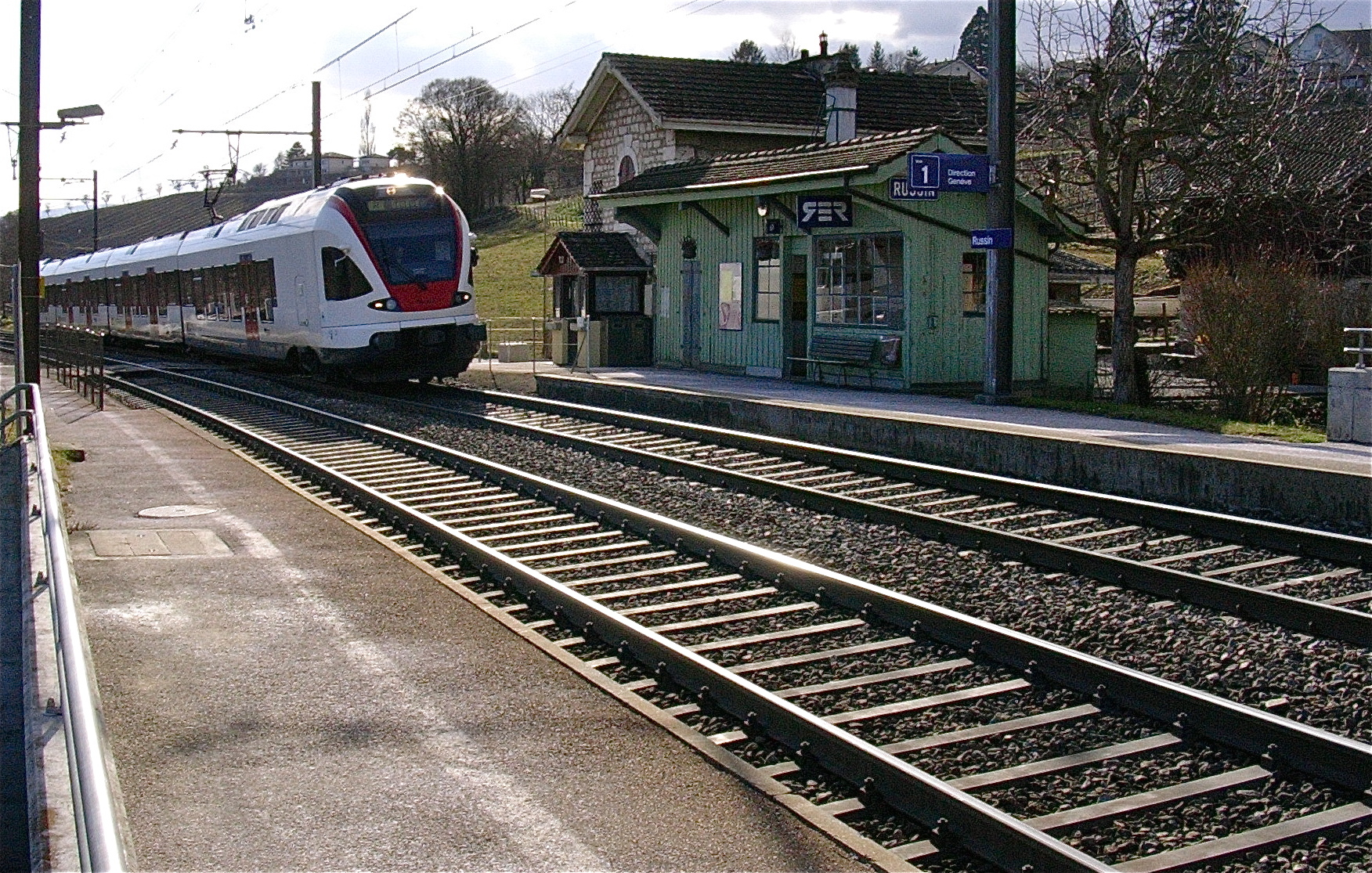 La gare de Russin, Canton de Genève